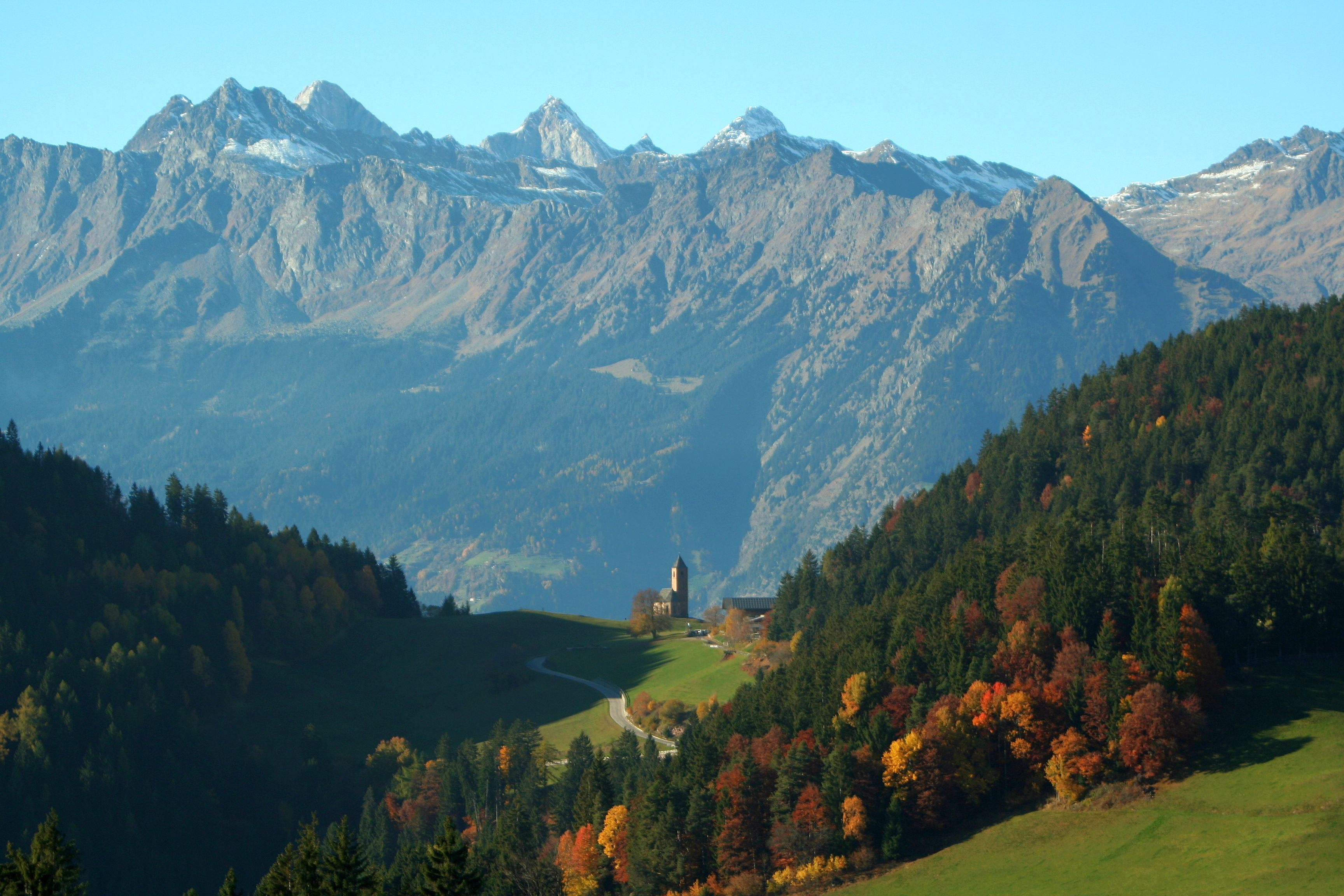 St. Katharina in der Scharte in der Gemeinde Hafling